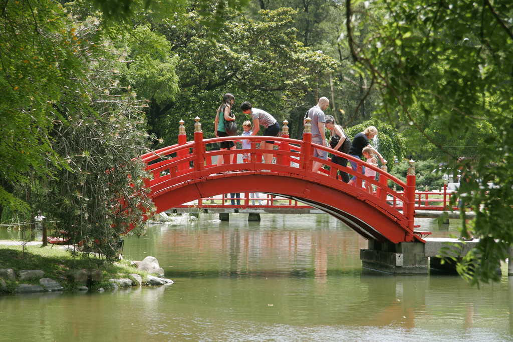 Los puentes son caracteristicos de la arquitectura japonesa. El más famoso es el llamado Puente de Dios.